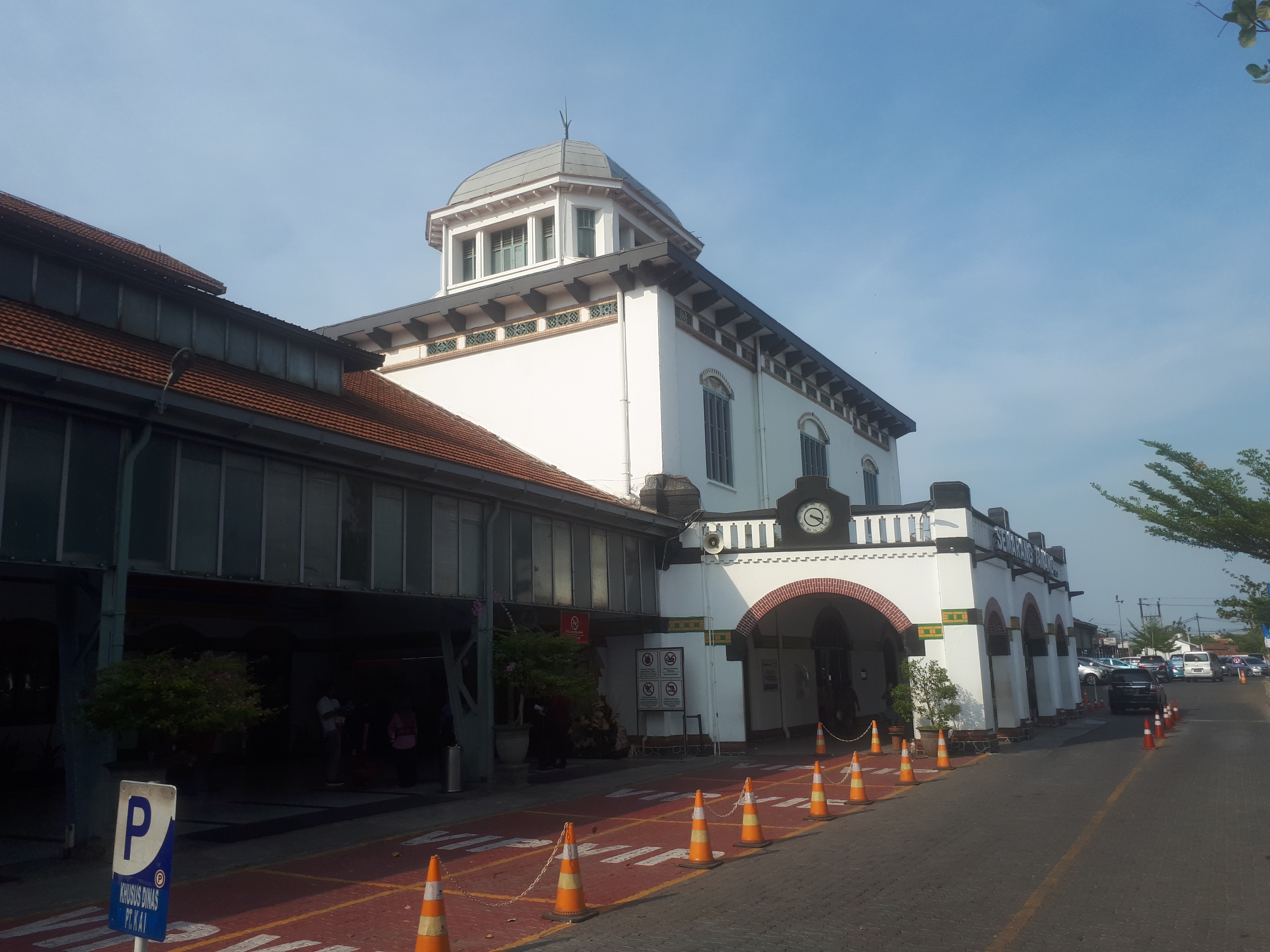 Halaman depan Stasiun Semarang Tawang sore hari tahun 2019